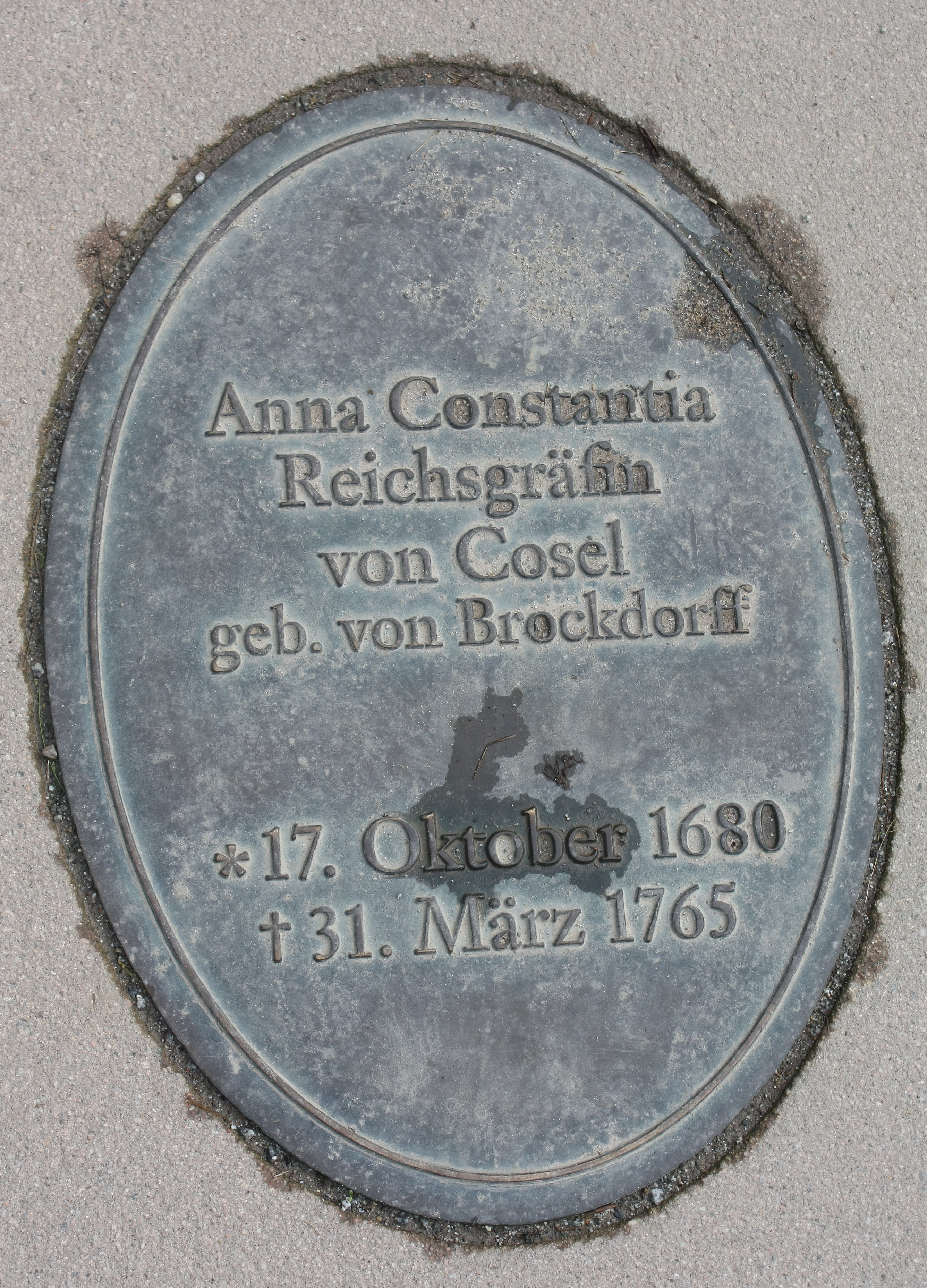 Grabinschrift auf dem Grab der Gräfin Constantia von Cosel auf Burg Stolpen (Sachsen)